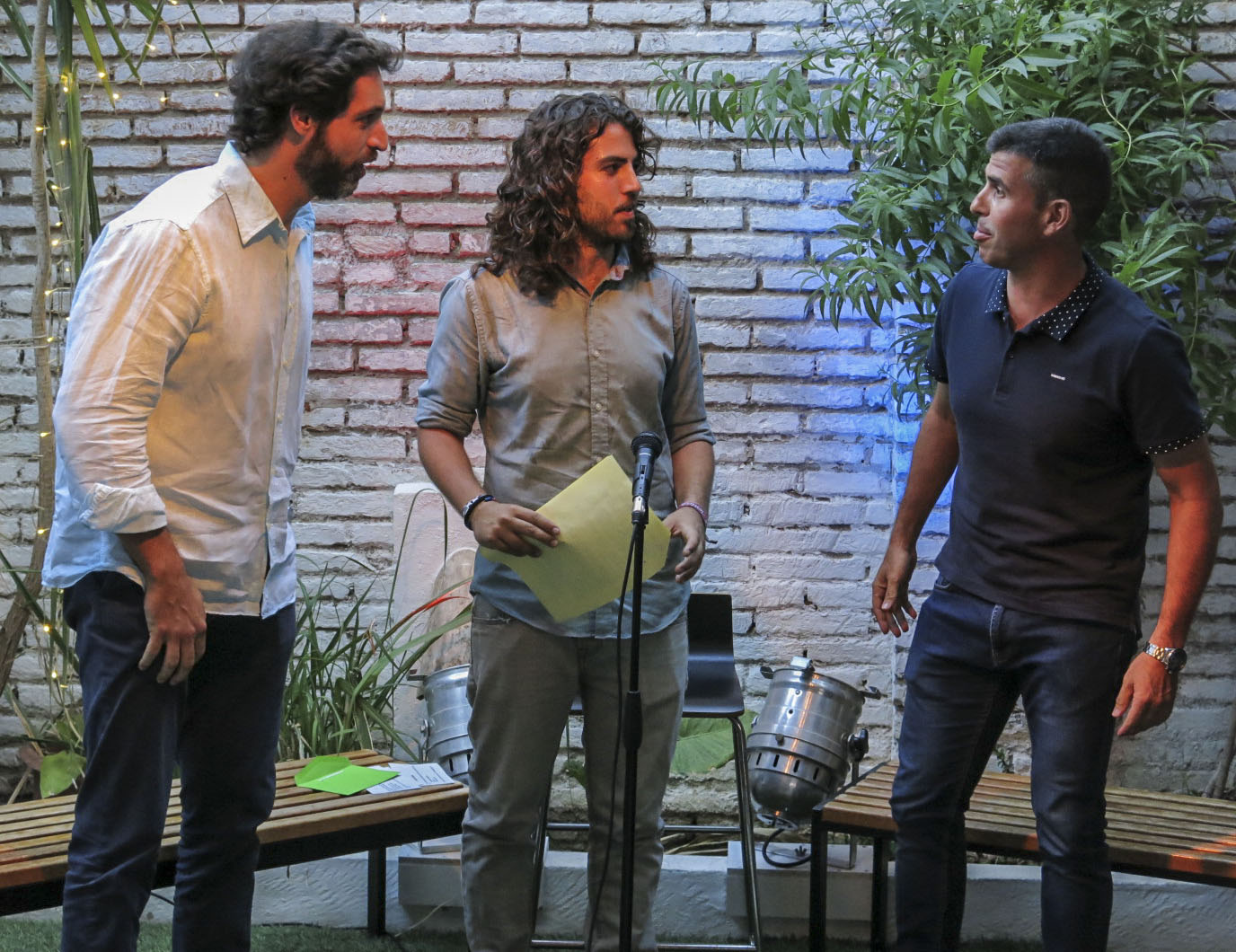 Projecte de col·laboració de l'Arxiu Ismael Latorre Mendoza amb Wikimedia Commons i Amical Wikimedia. Acte de presentació del diari digital PilotaViu, divendres 15 de juny a partir de les 19:30 de la vesprada, a la Casa Cantonera d'Algemesí. PilotaViu va començar una nova etapa el passat 1 de gener de 2018, amb el canvi de nom. Varen participar Waldo i Àlvaro, dos autèntics mites de la pilota i les jugadores del CPV Algemesí. La tertúlia va ser conduïda per Pau Molins i Pepa Gómez.